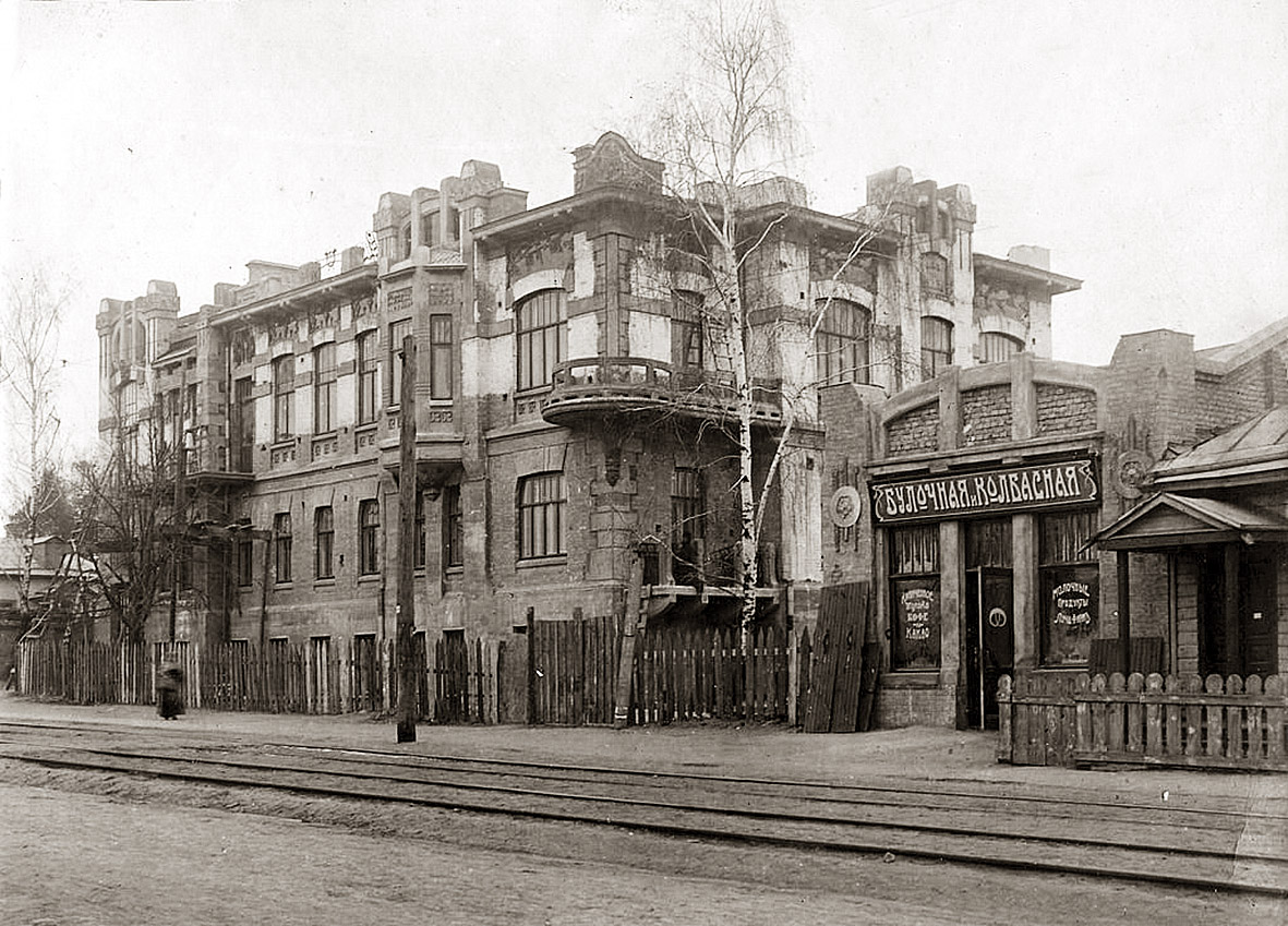 Будинок з ірисами, Київ, вул. Юрія Іллєнка, 8